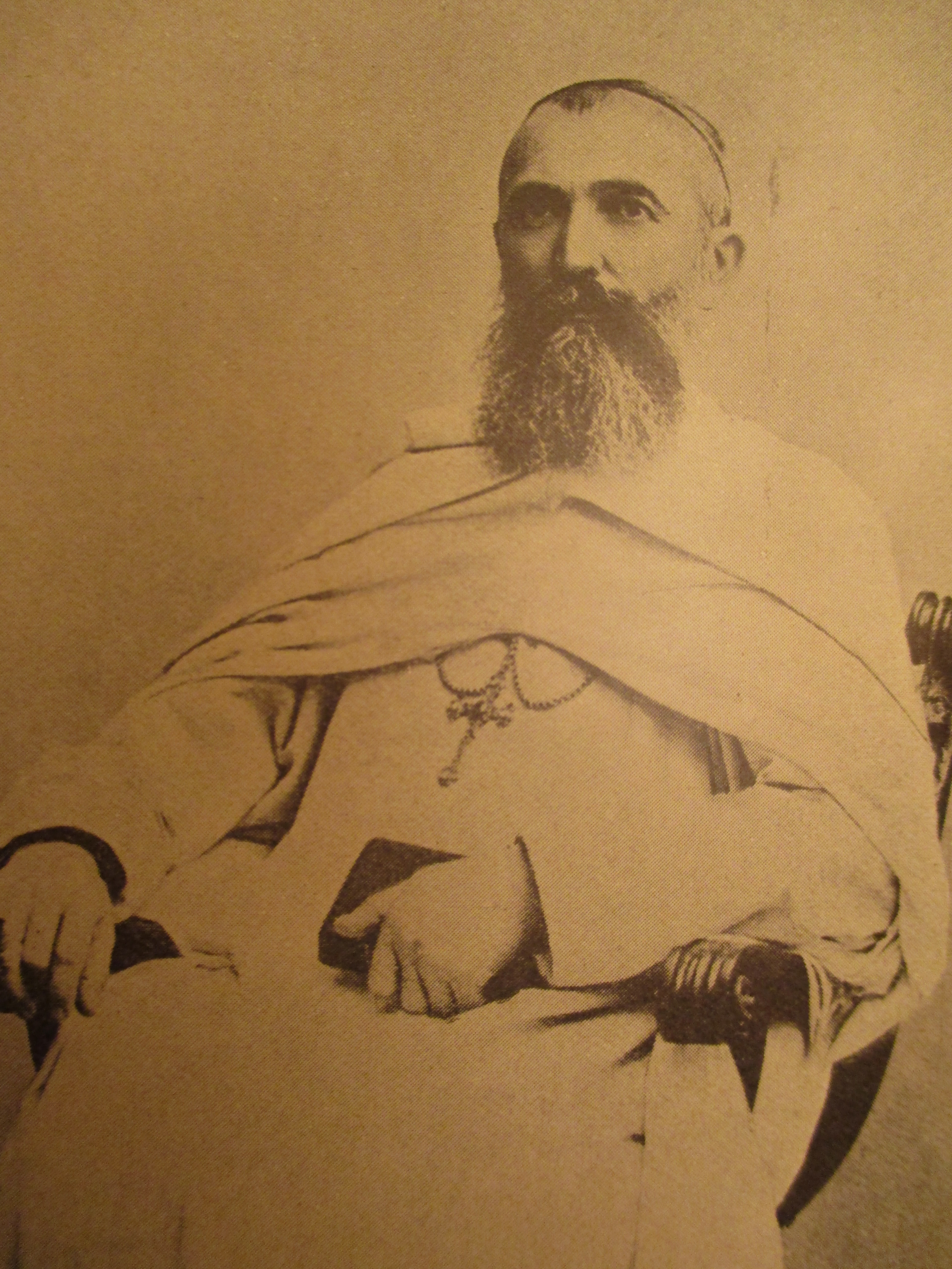 Photographie de Mgr Léon Livinhac (1846-1922)